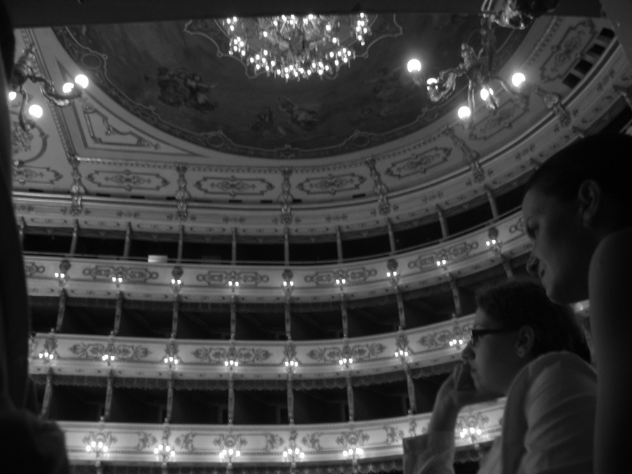 Teatro Regio, Parma